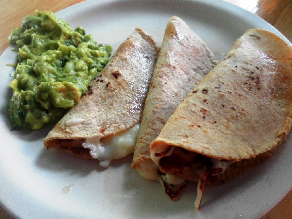 La Condesa, Mexico City